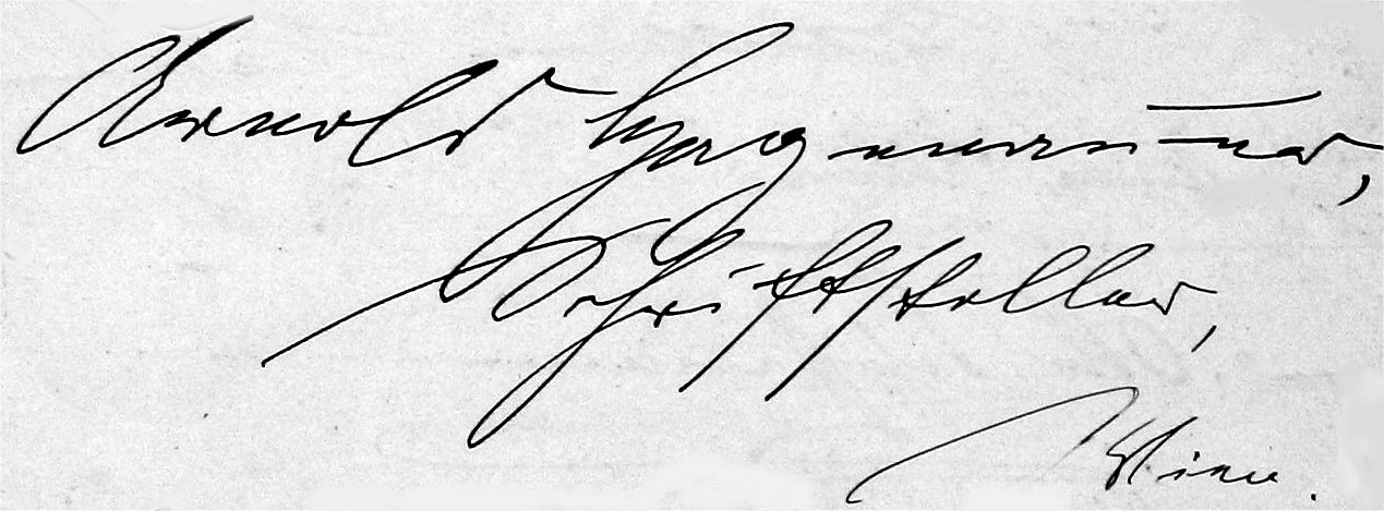 Unterschrift des Schriftstellers Arnold Hagenauer